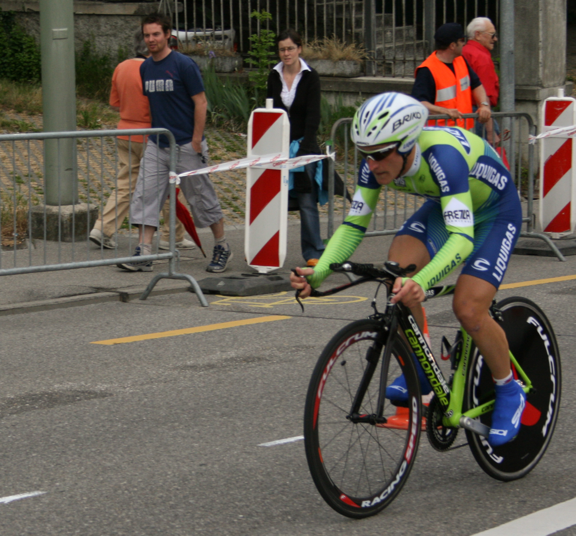 Enrico Gasparotto prologue du Tour de Romandie 2007